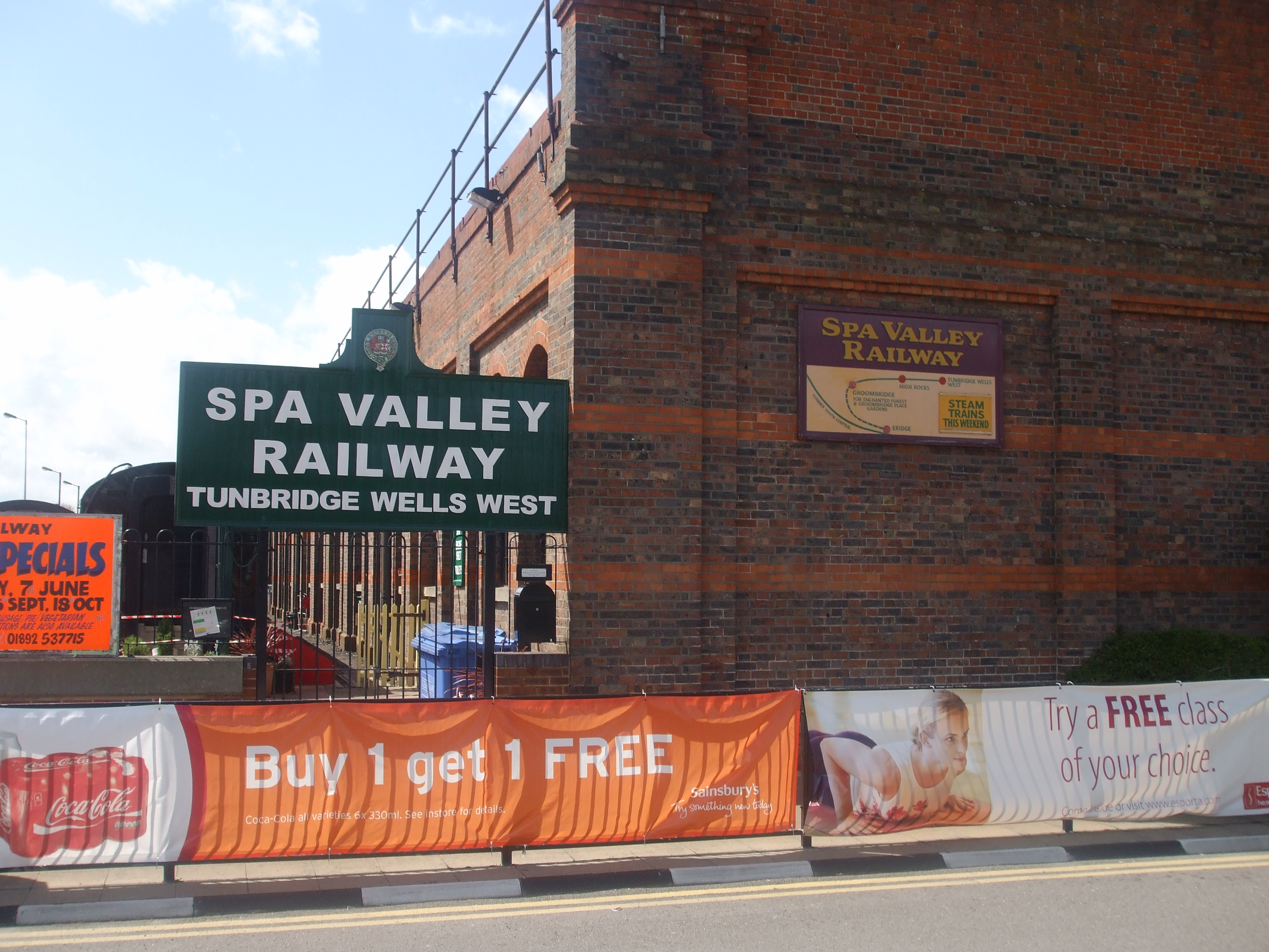 Tunbridge Wells West Station, Kent